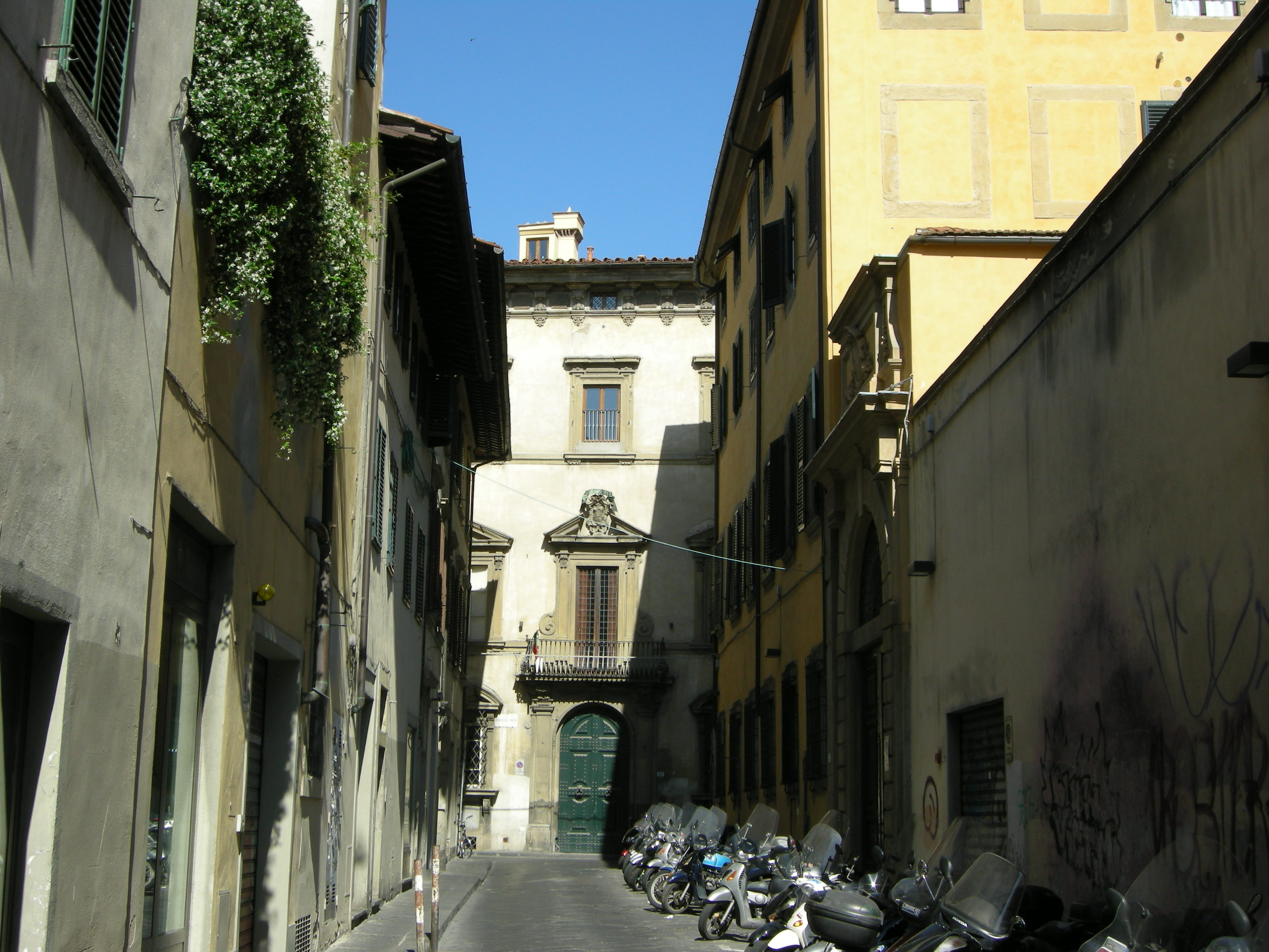 Palazzo rofffia, veduta da via di mezzo